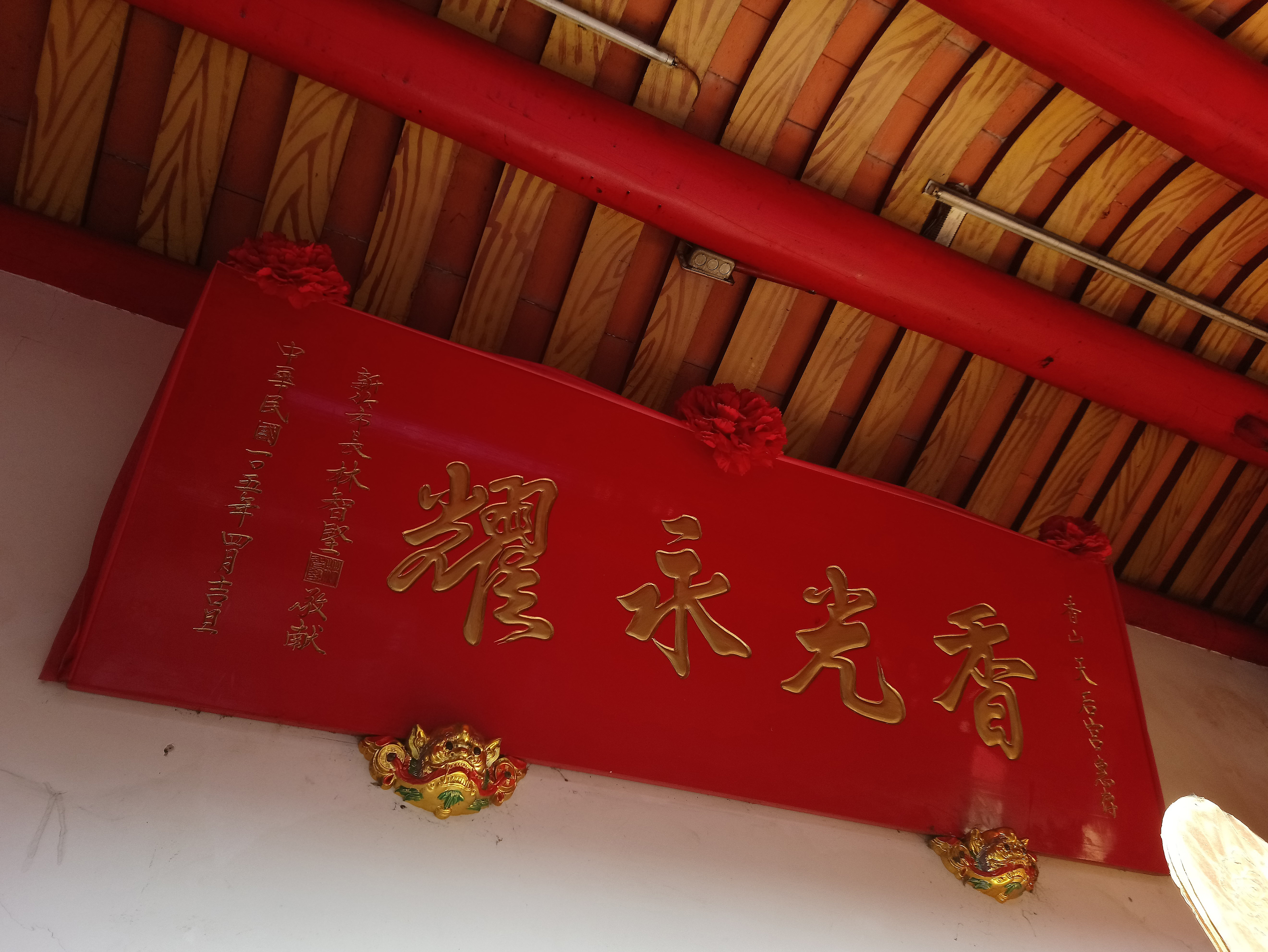 香山天后宮內新竹市市長林智堅所贈「香光永耀」匾額。